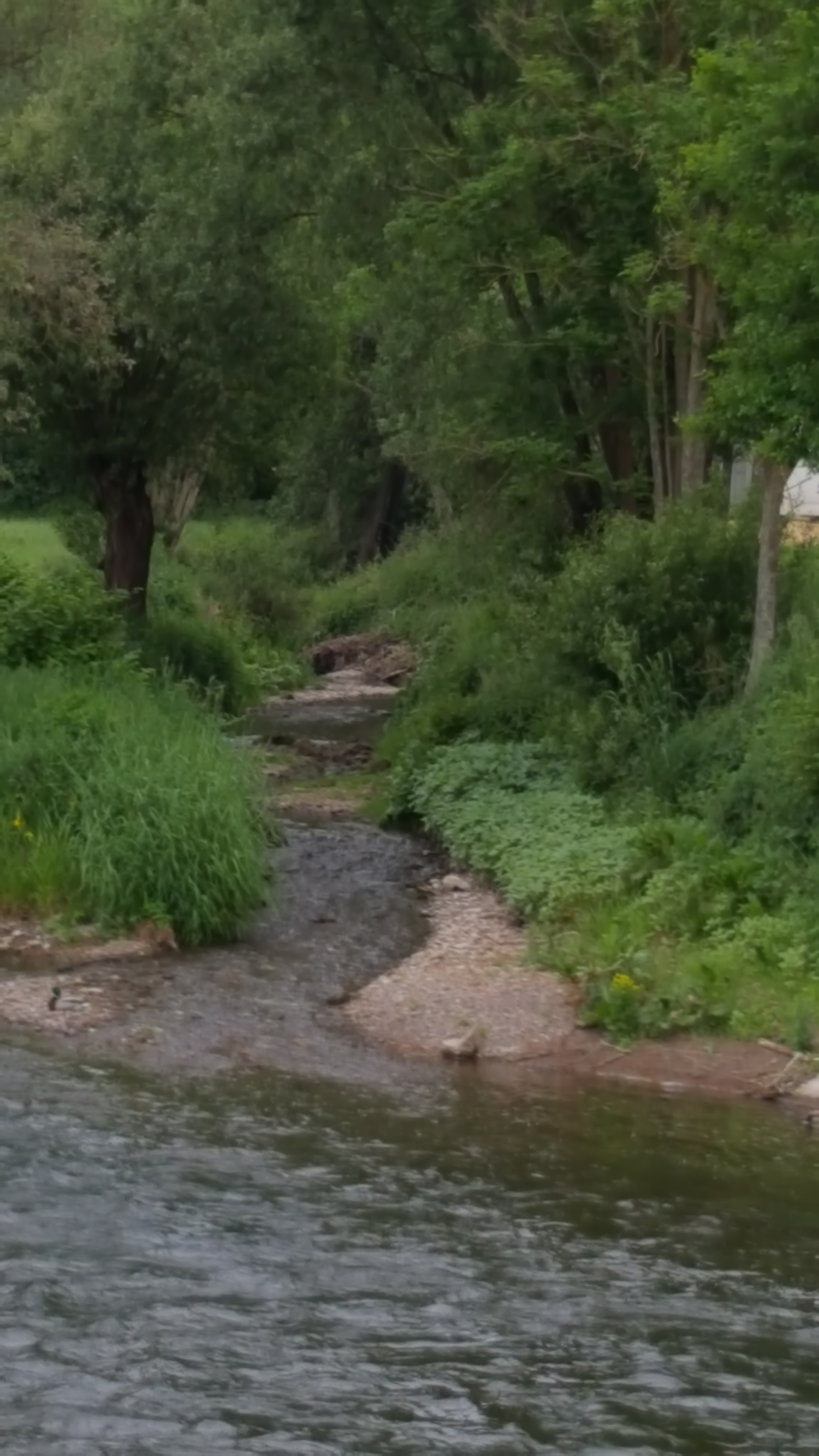 D'Mündung vun der Blees an d'Sauer op der Bleesbréck am Mee 2017